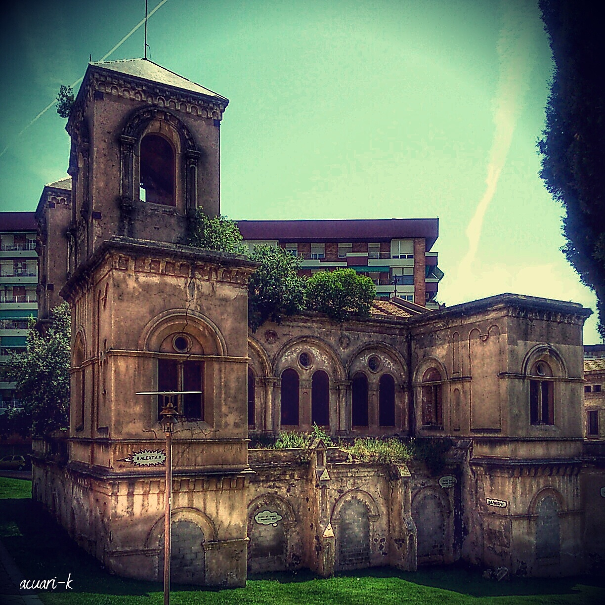 Imatges de l'exposició Descobreix les 10 Barcelones, una exposició fotogràfica que explora els racons més singulars i menys coneguts dels deu districtes barcelonins. Reconegudes amb la seva incorporació al banc d'imatges de la Viquipèdia, les 100 imatges que componen la mostra s'han escollit entre les més de 3.000 presentades al concurs de fotografia mòbil convocat per a l'exposició. Es tracta d'un projecte col·laboratiu creat pels ciutadans per captar l'essència menys tòpica de la ciutat. Ho organitza: Ajuntament de Barcelona i Dive. Amb la col·laboració de Descobreix Catalunya, Instagramers i Amical Wikimedia